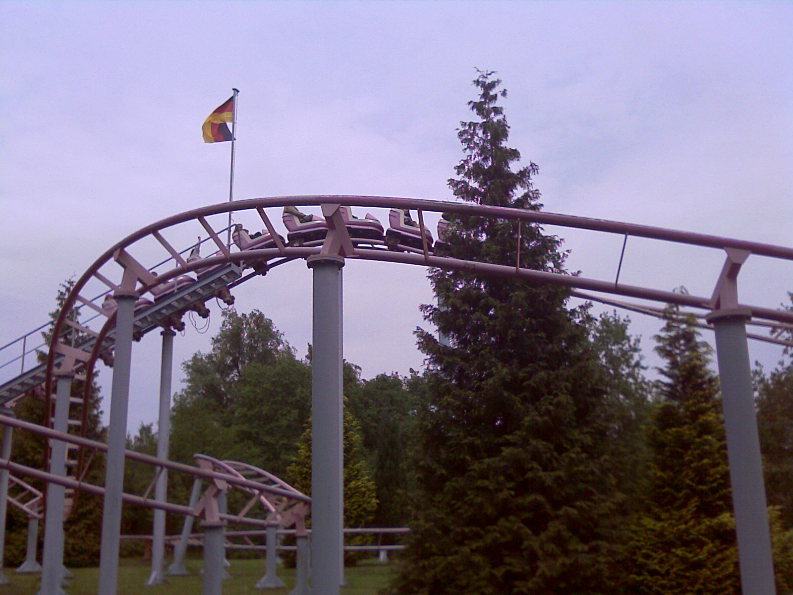 Rastiland Achterbahn